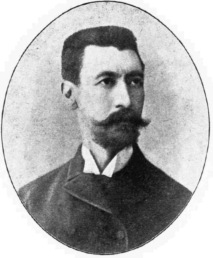 Griechischer Politiker, 19. Jahrhundert